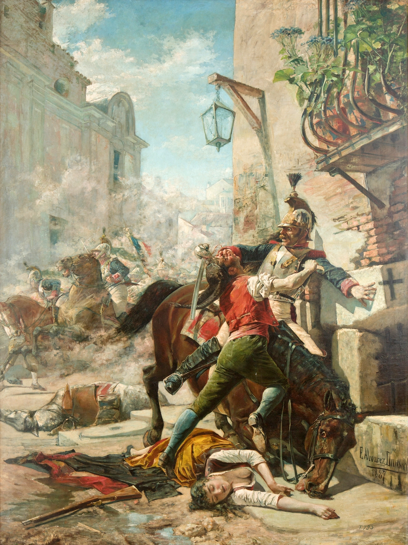 Premiado con una tercera medalla en la exposición nacional de Bellas Artes de 1887, el cuadro rinde homenaje a dos de los héroes que alcanzaron más legendaria gloria en la lucha del pueblo de Madrid contra las tropas francesas durante la Guerra de la Independencia. Así, ilustra el momento en que el guerrillero Juan Malasaña da muerte al dragón francés que acaba de asesinar a su hija, la bordadora Manuela Malasaña, quien suministraba a su padre los cartuchos de fusil para combatir desde su casa a las tropas francesas, durante el asalto al parque de Monteleón. Este cuadro es probablemente el mejor testimonio de la faceta más característica de la producción de Eugenio Álvarez Dumont, quien, junto con su hermano César, llegaron a convertirse en verdaderos especialistas en pintar escenas bélicas y militares y muy particularmente de temas relativos a la Guerra de la Independencia.